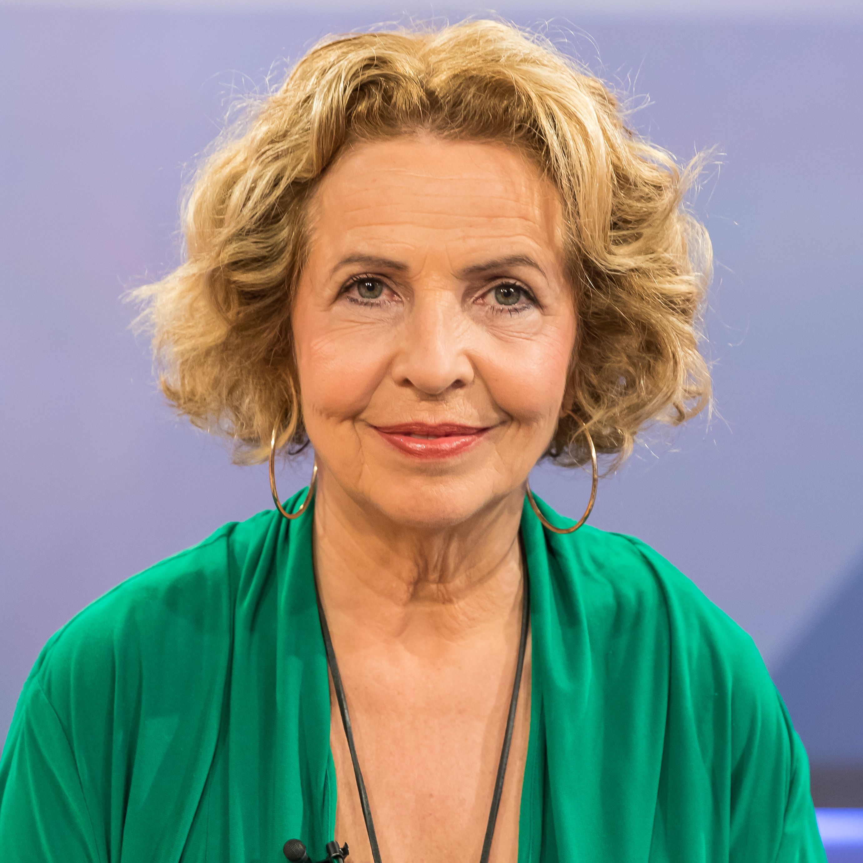 MAISCHBERGER am 3. April 2019 in Köln. Produziert vom WDR. Thema der Sendung: „Ernährung als Religion: Kann denn Essen Sünde sein?“ Foto: Michaela May (Schauspielerin)